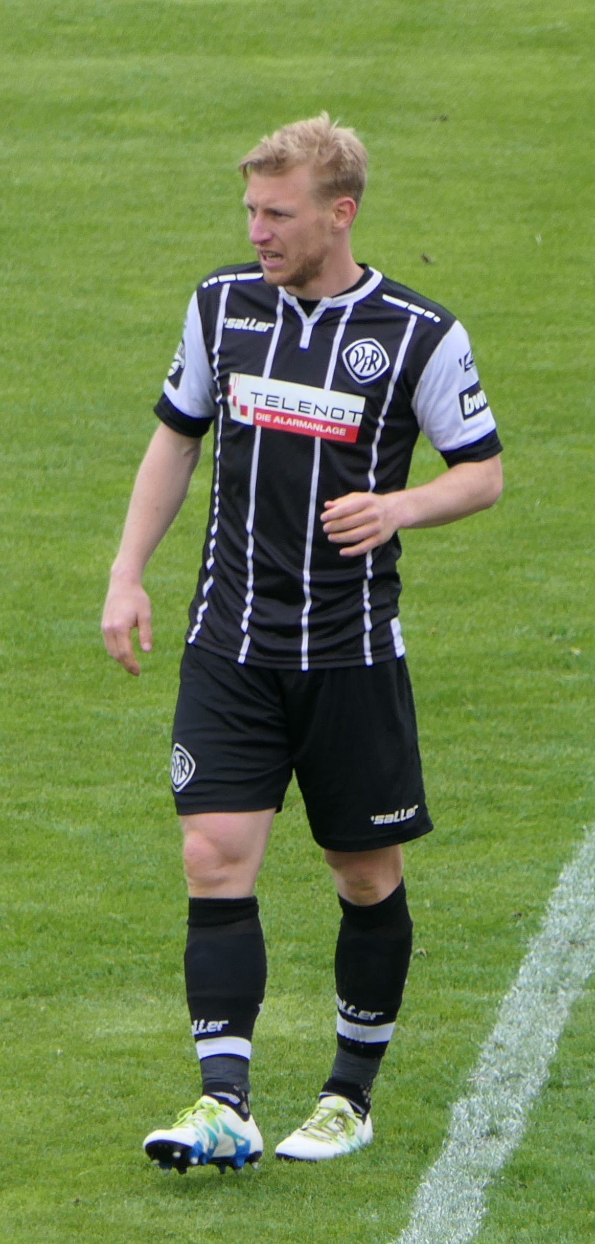 Der Fussballprofi Patrick Funk im Trikot des VfR Aalen beim Heimspiel gegen Eintracht Braunschweig am 05.05.2019.